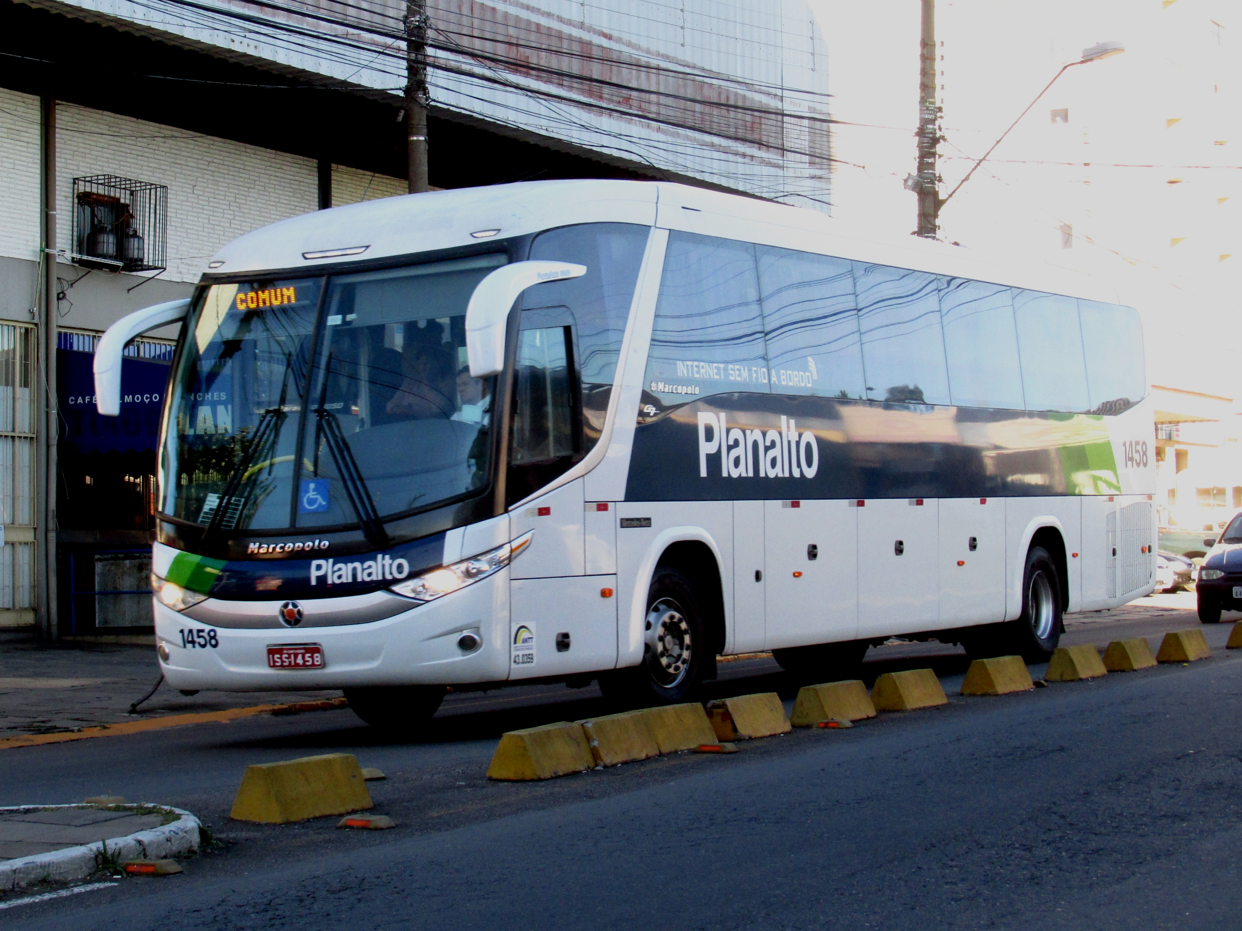 Planalto - 1458